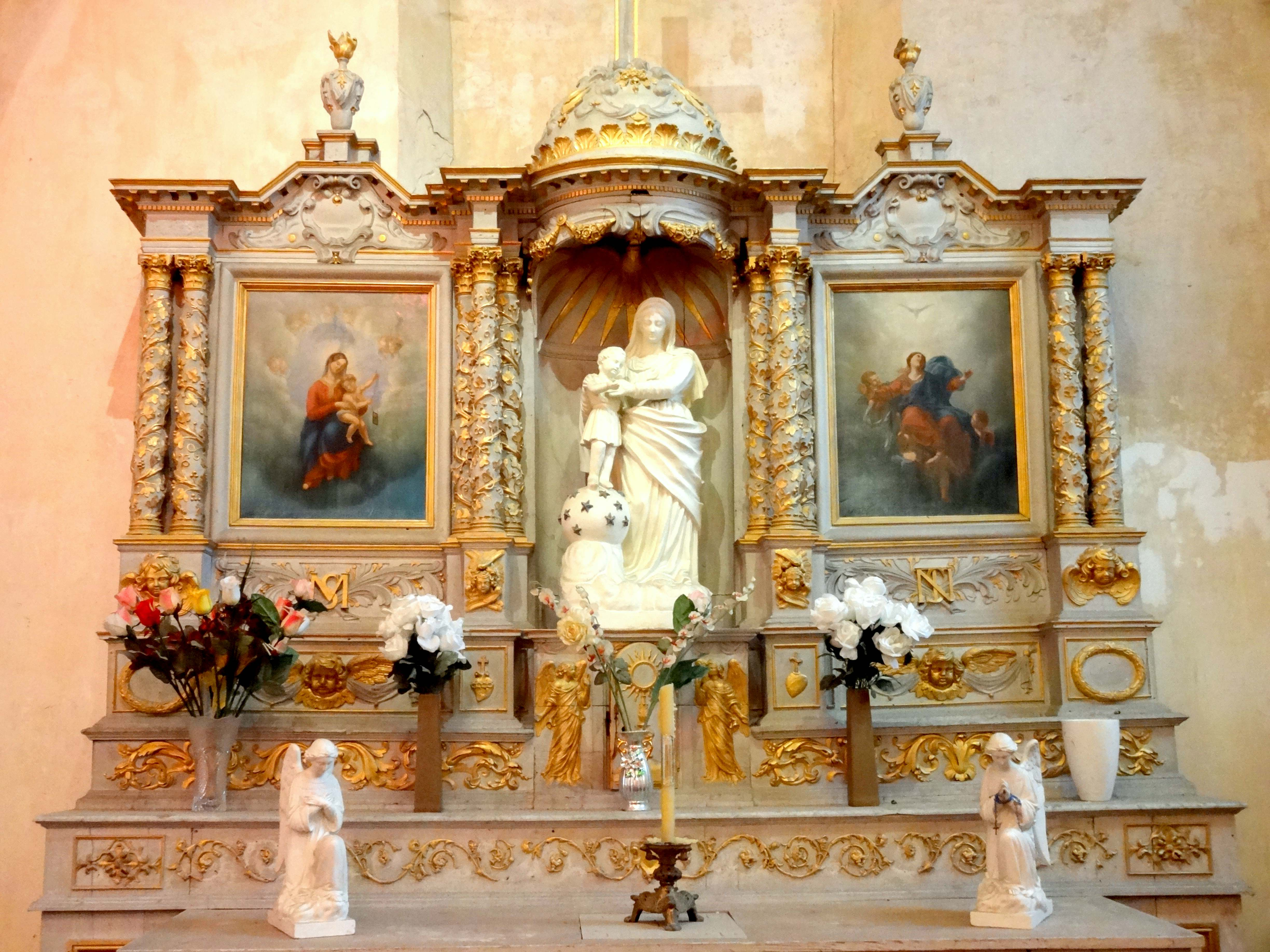 Mobilier de l'église - voir titre.